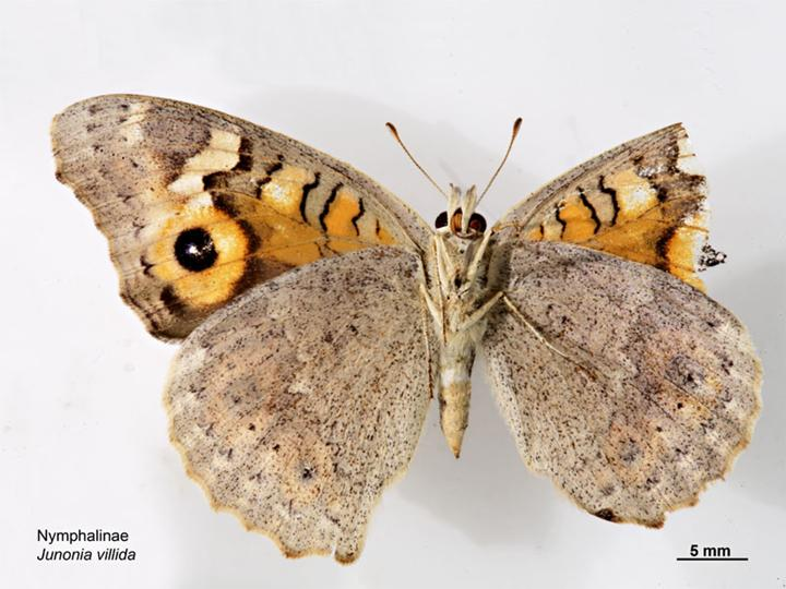 Junonia villida, ventral view.